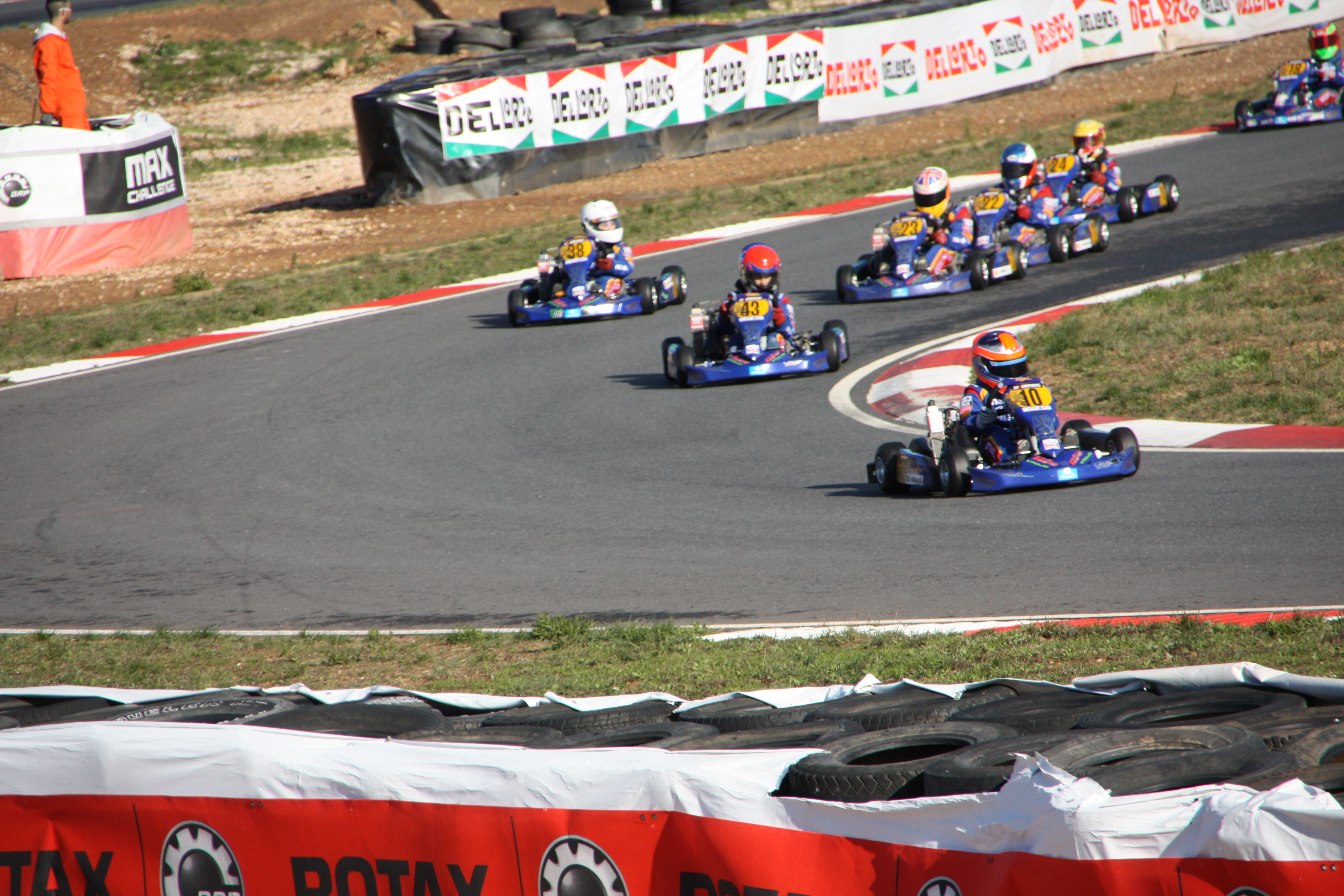 On the Track